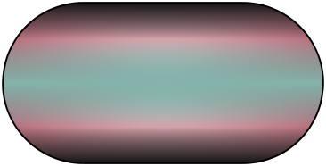 mira zkresleni